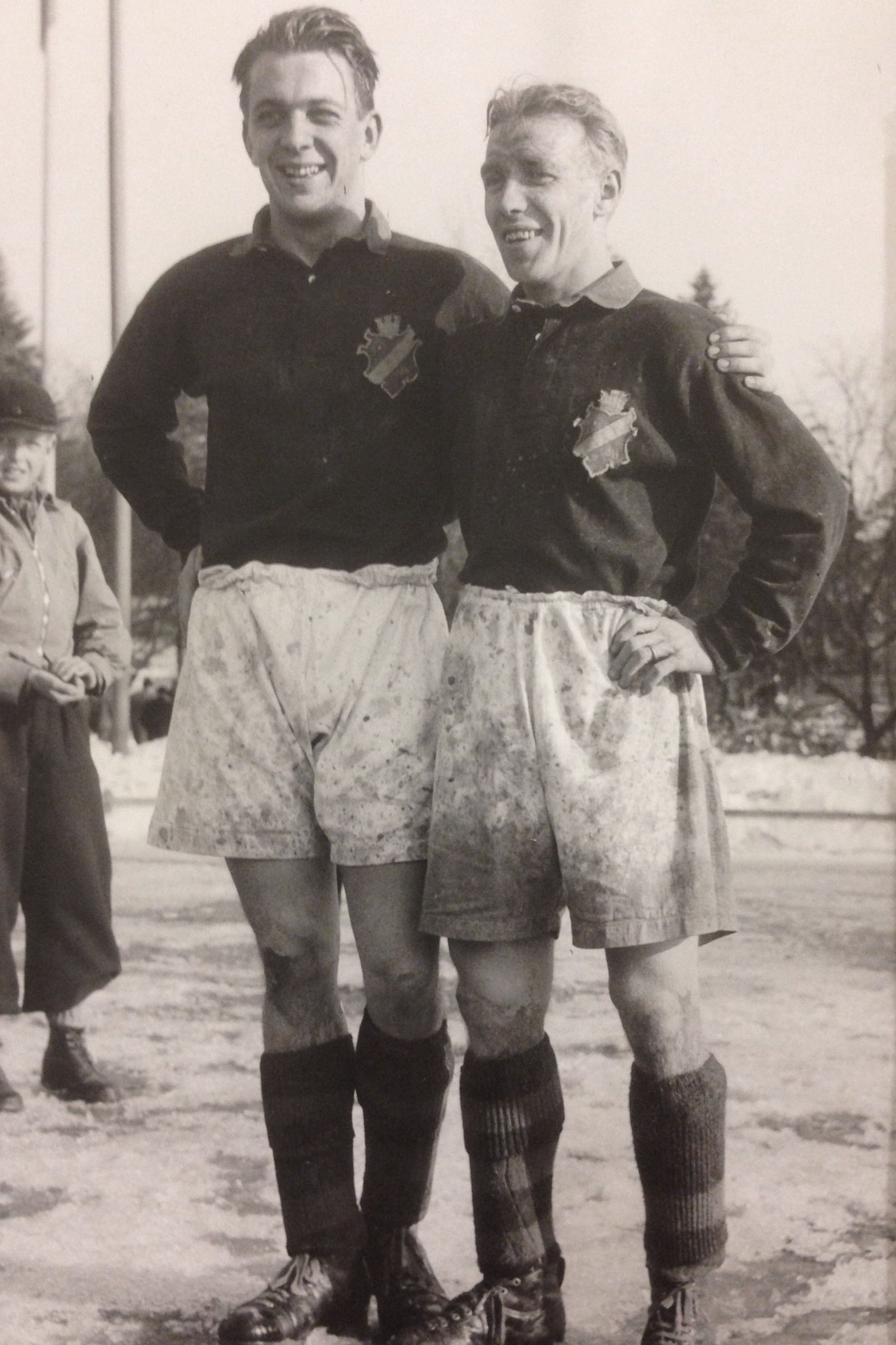 AIK-Hammarby IF, 2-0, försäsongsmatch på Zinkensdamms IP. Målskyttarna Henry "Garvis" Carlsson och Arne Andersson på bilden.